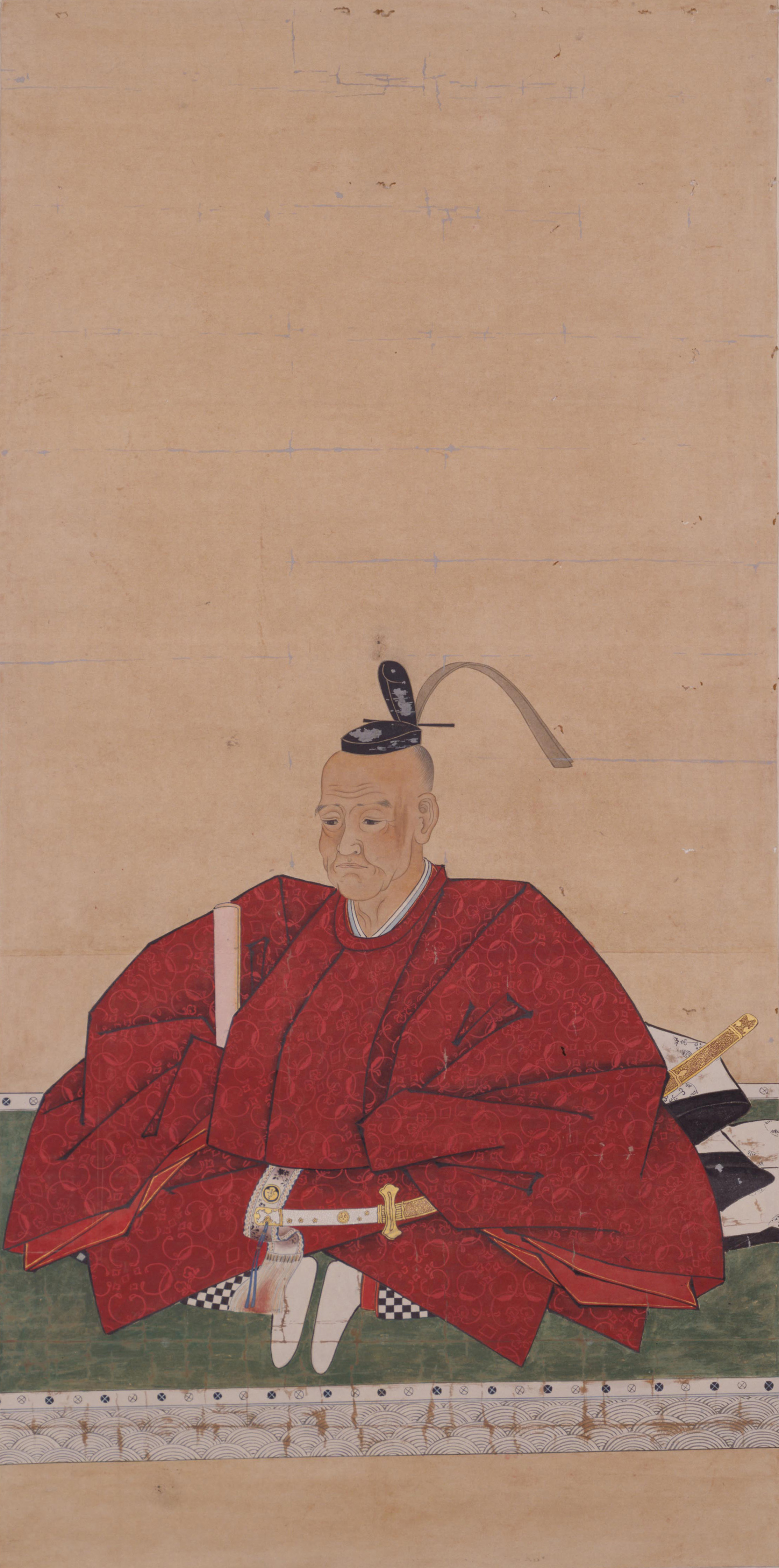 安藤直次の肖像。